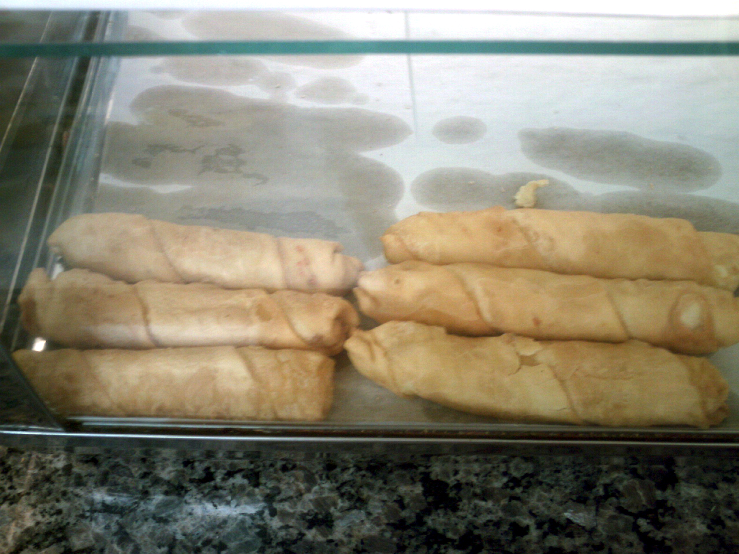 Tequenos en Vidriera en el Pataconazo de Exito, San Francisco, Edo. Zulia, Venezuela.